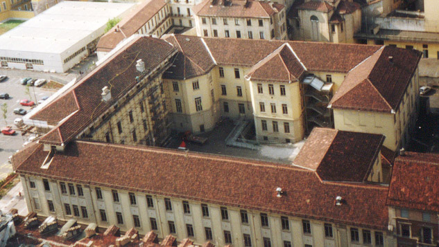 Liceo Classico Vincenzo Gioberti, Torino, Italy.